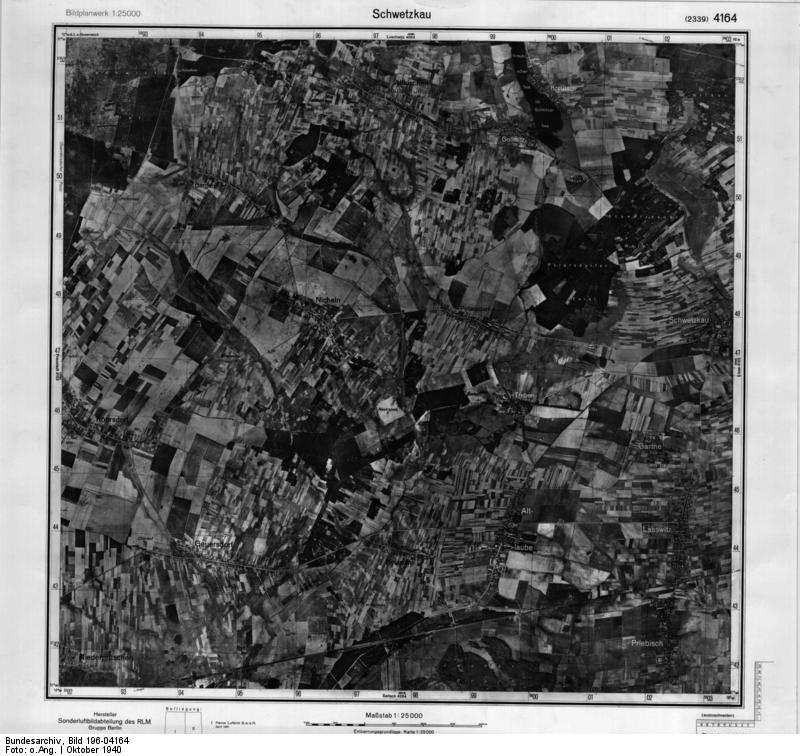 Schwetzkau